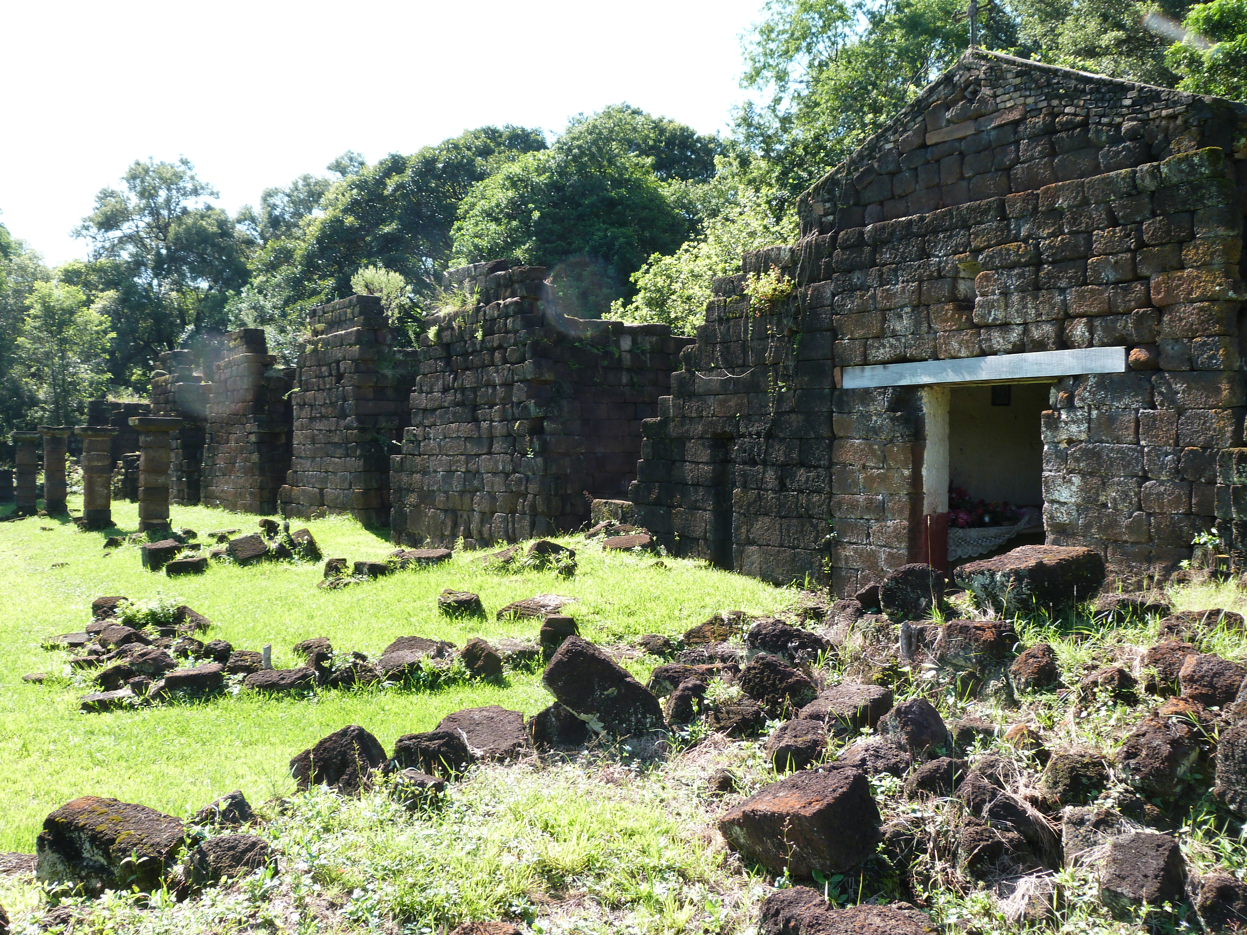 Misión jesuítica de Santa María la Mayor